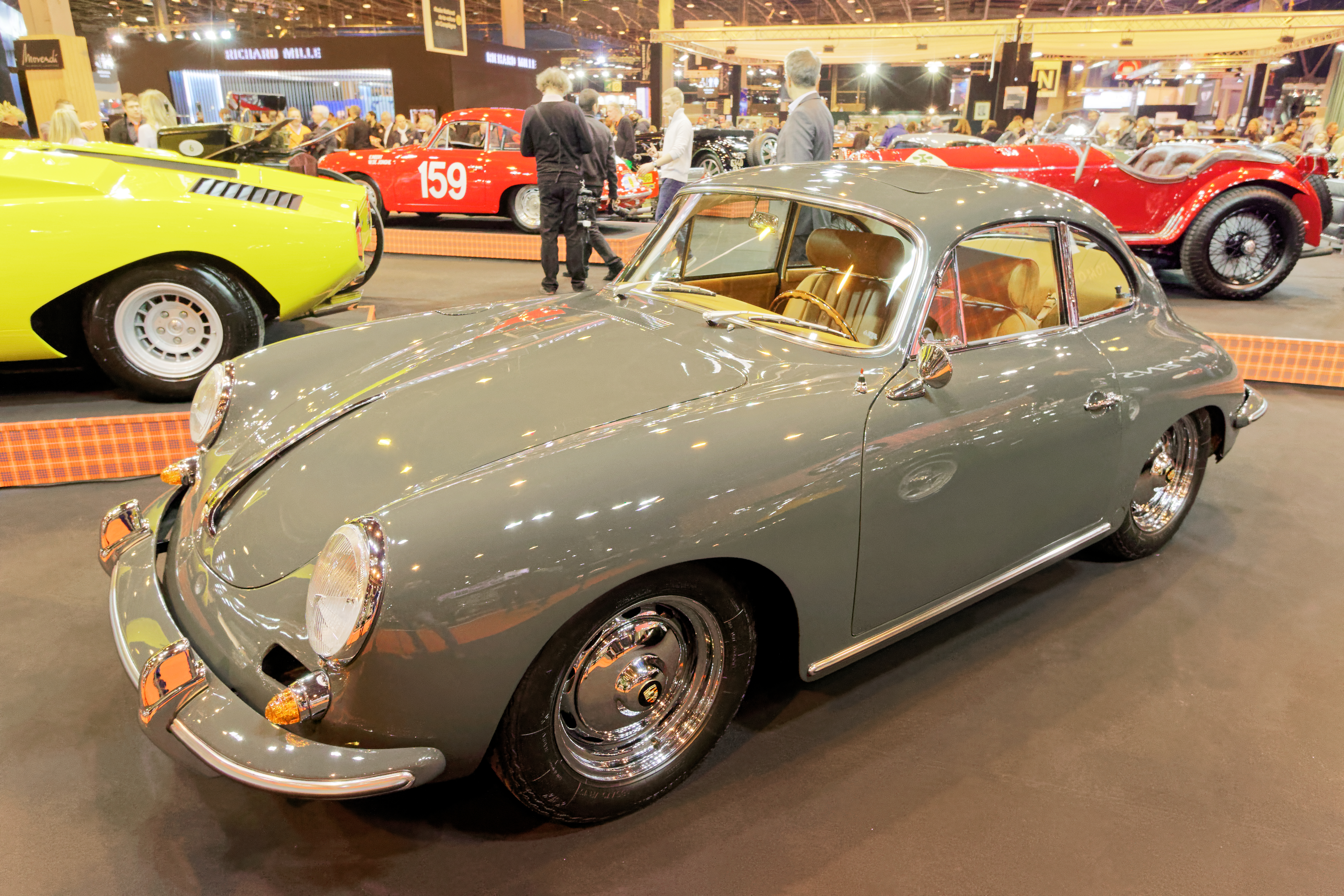 Une Porsche 356 Carrera 2 GS de 1963 exposée lors du salon Rétromobile 2017.